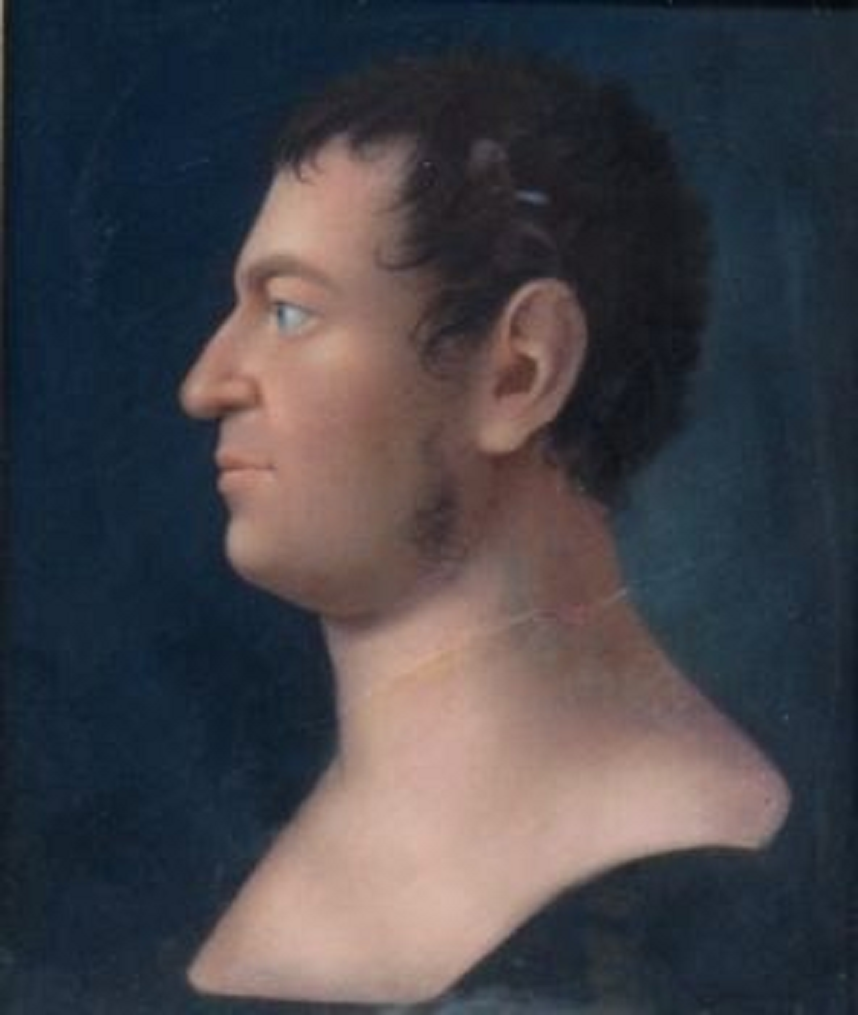 Theodor Konrad von Kretschmann (1762–1820)Portrait im Profil dargestellt.